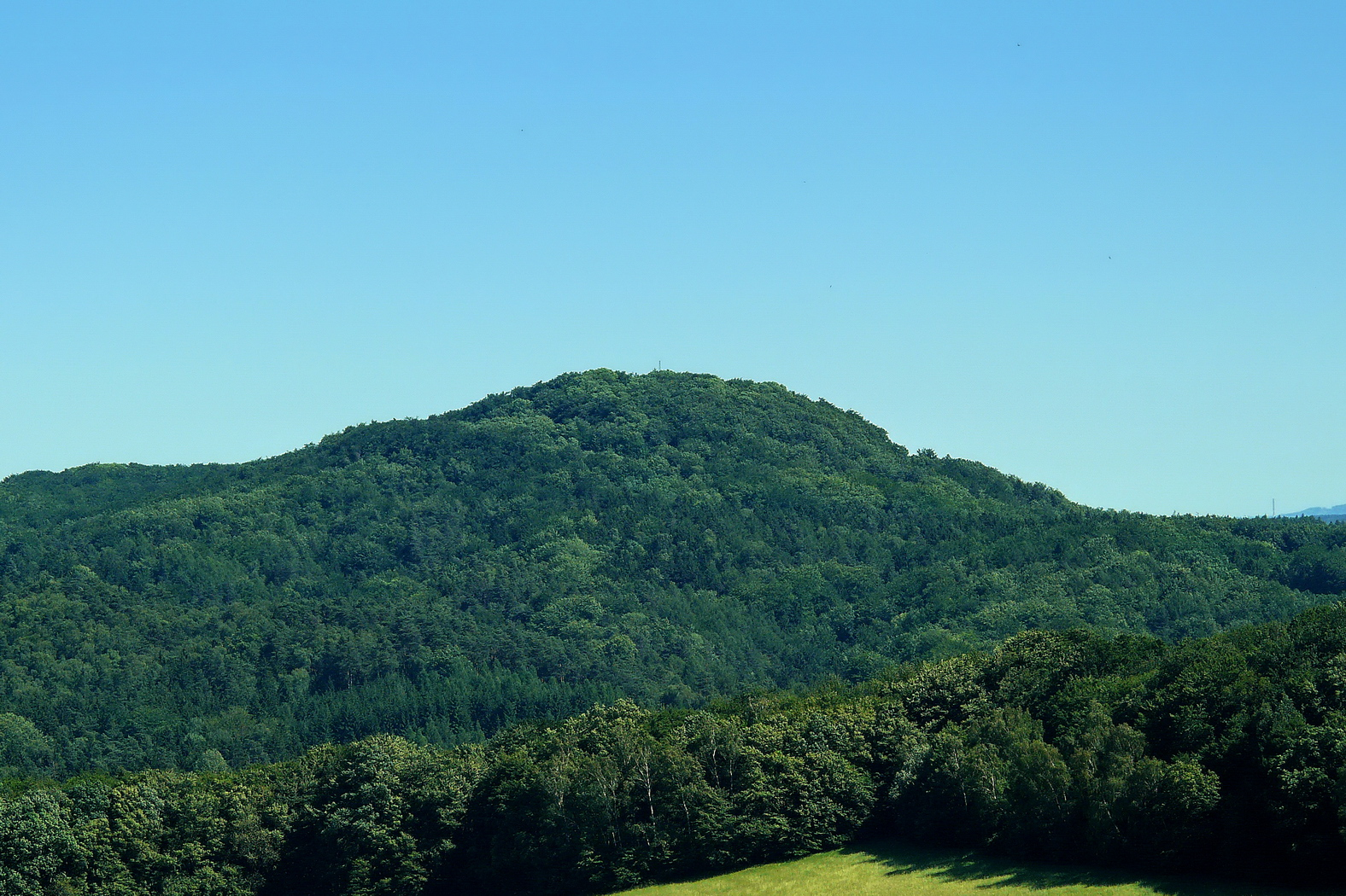 Vrch Dub z Lysé skály